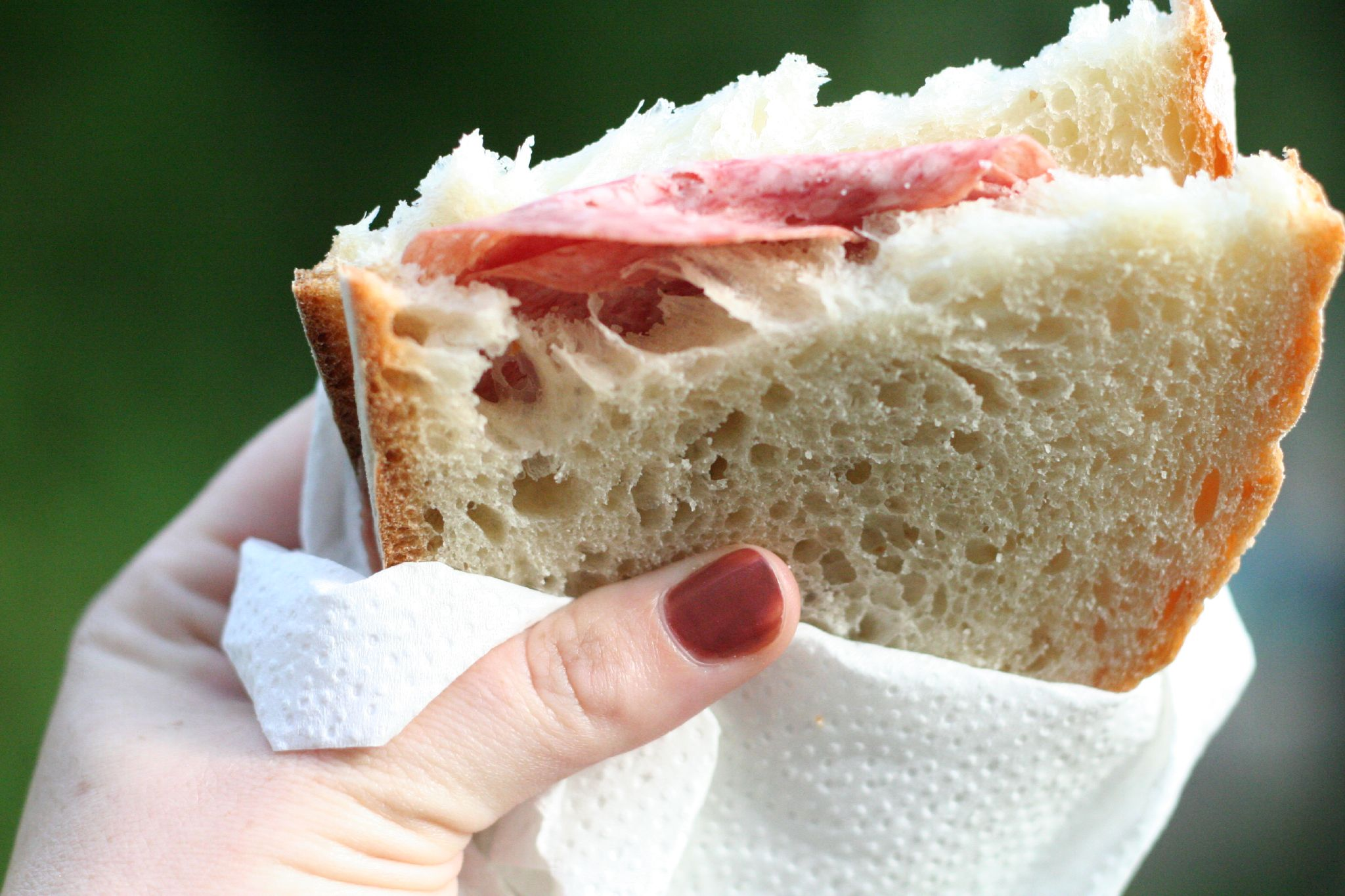 A salami sandwich